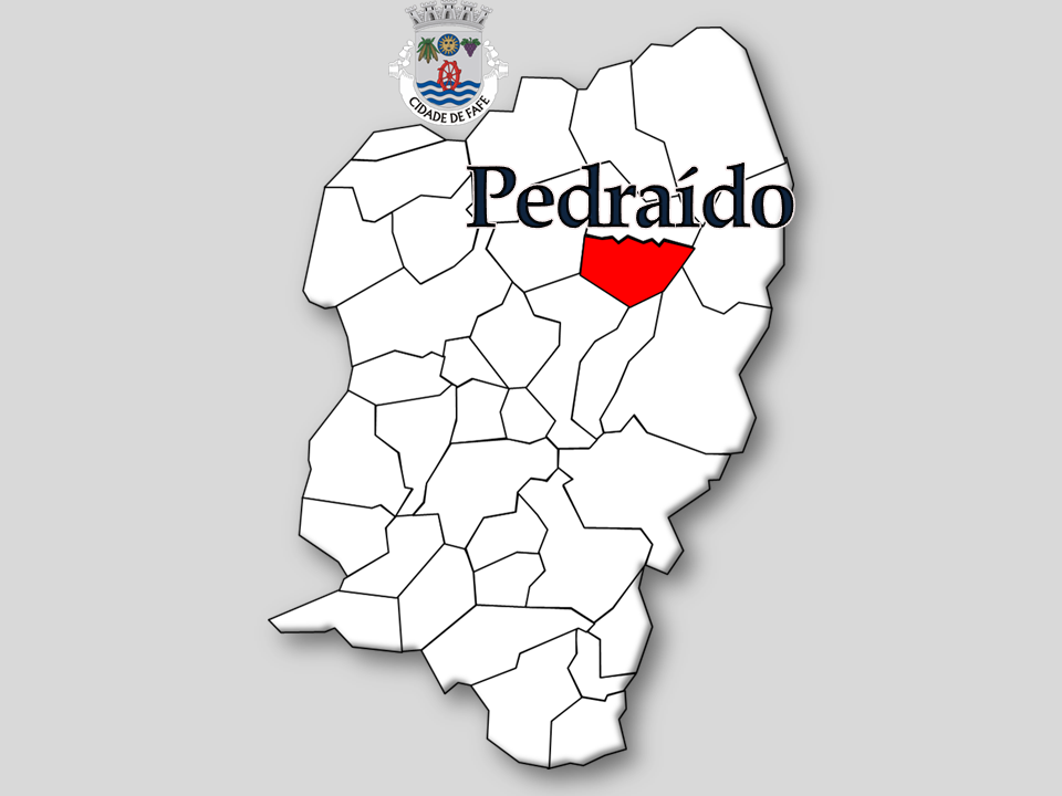 Censos 1864/2011